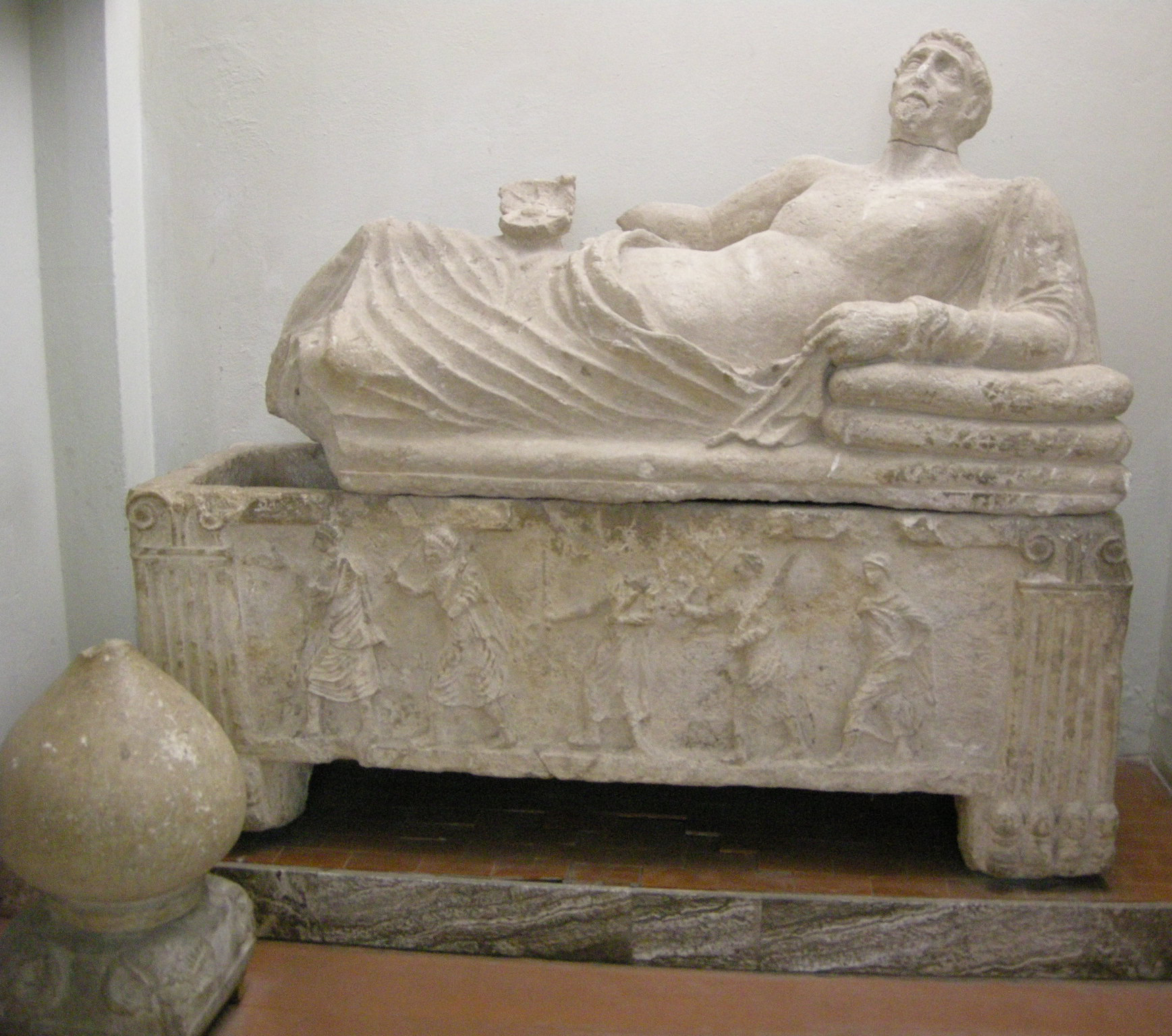 Museo guarnacci, sarcofacogo etrusco in stile chiusino